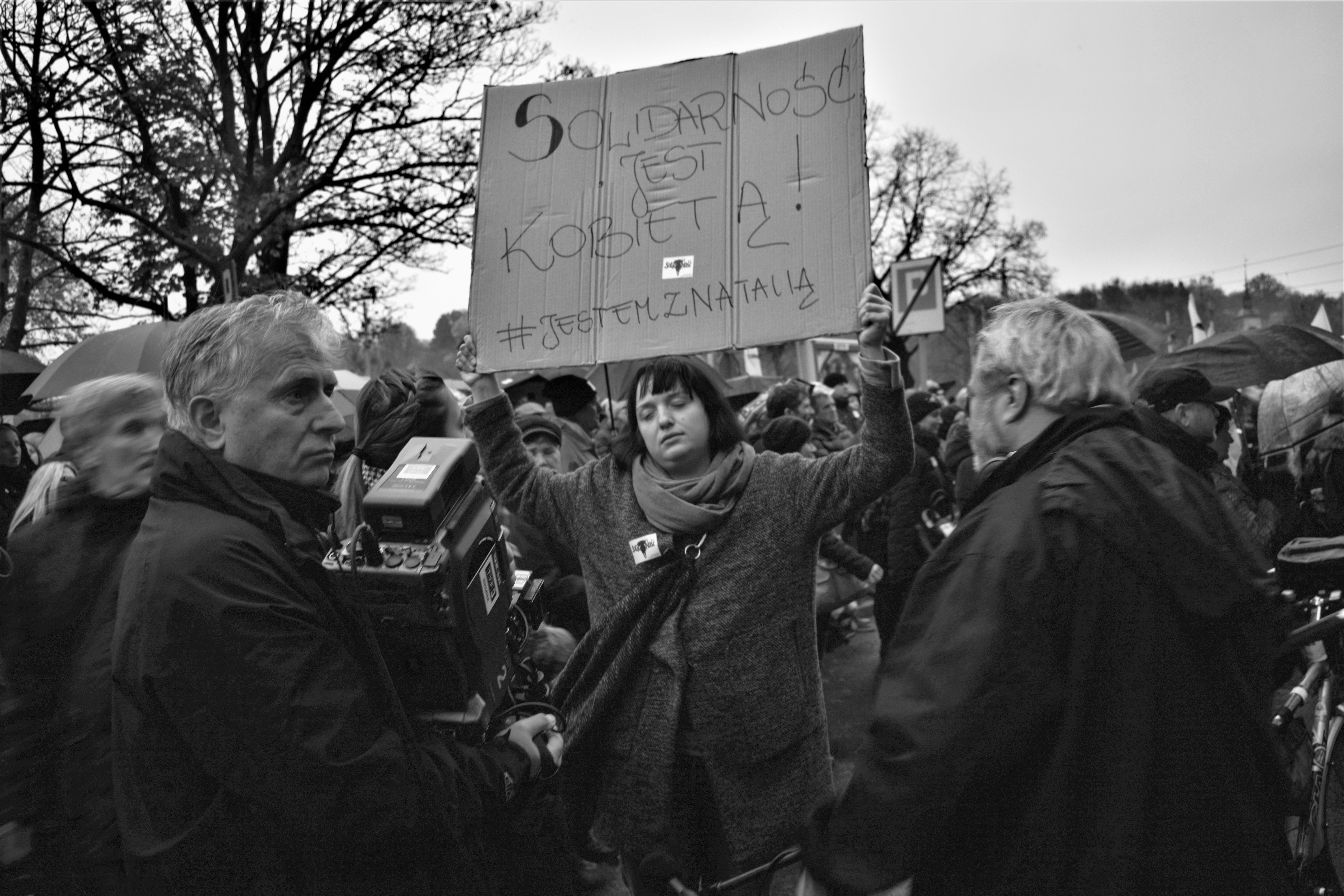 Polki protestują przeciwko aborcji